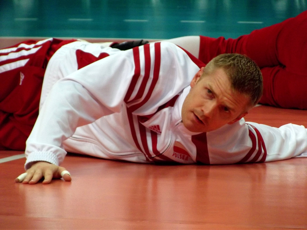 Zdjęcie zrobione podczas zawodów Ligi Światowej 2012 w katowickim Spodku.